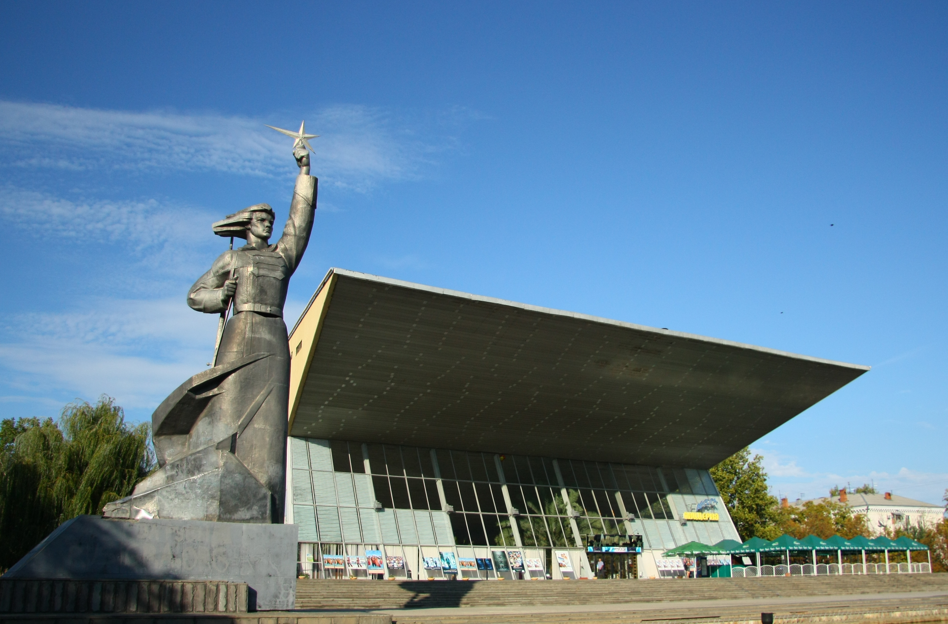 Cine Avrovra, Krasnodar, Rusia.